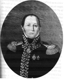 Général_Eloi_Charlemagne_Taupin